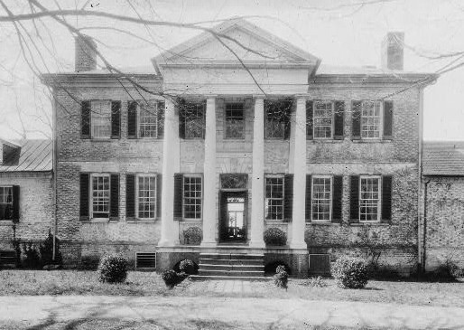 Sabine Hall (Richmond, Virginia) (cropped)